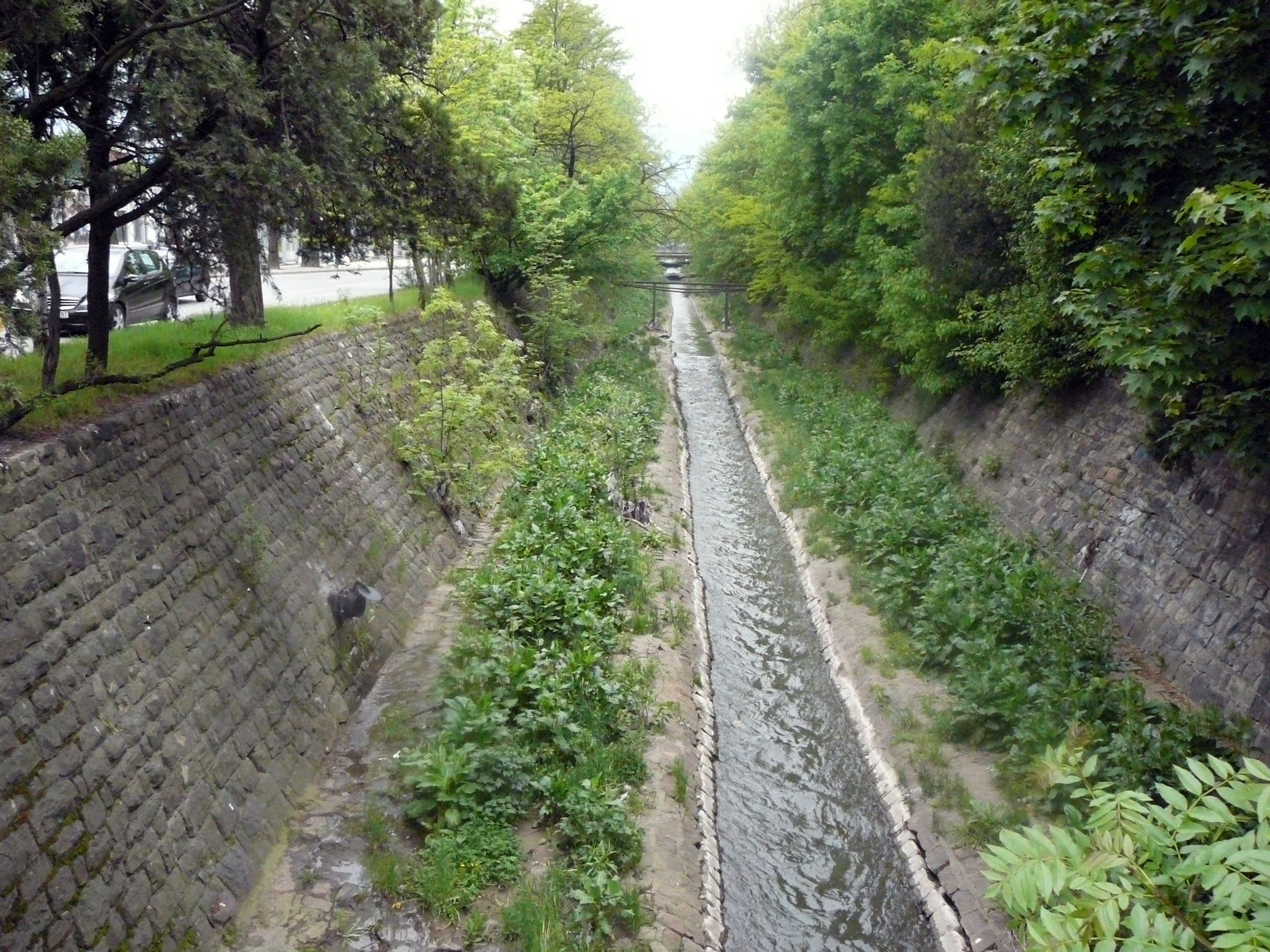 Perlovska river, Sofia, Bulgaria